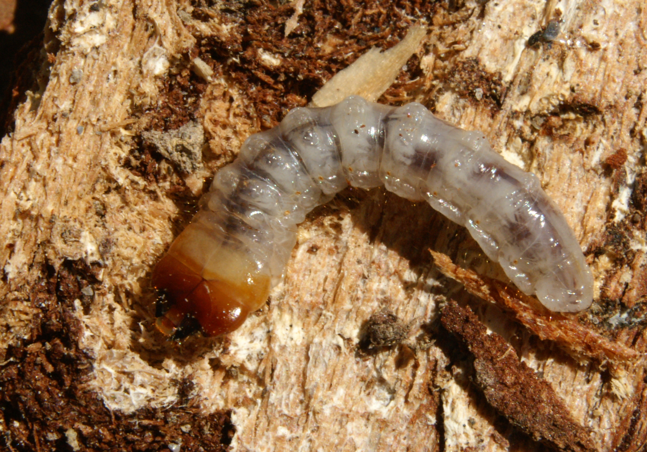 Bockkäferlarve